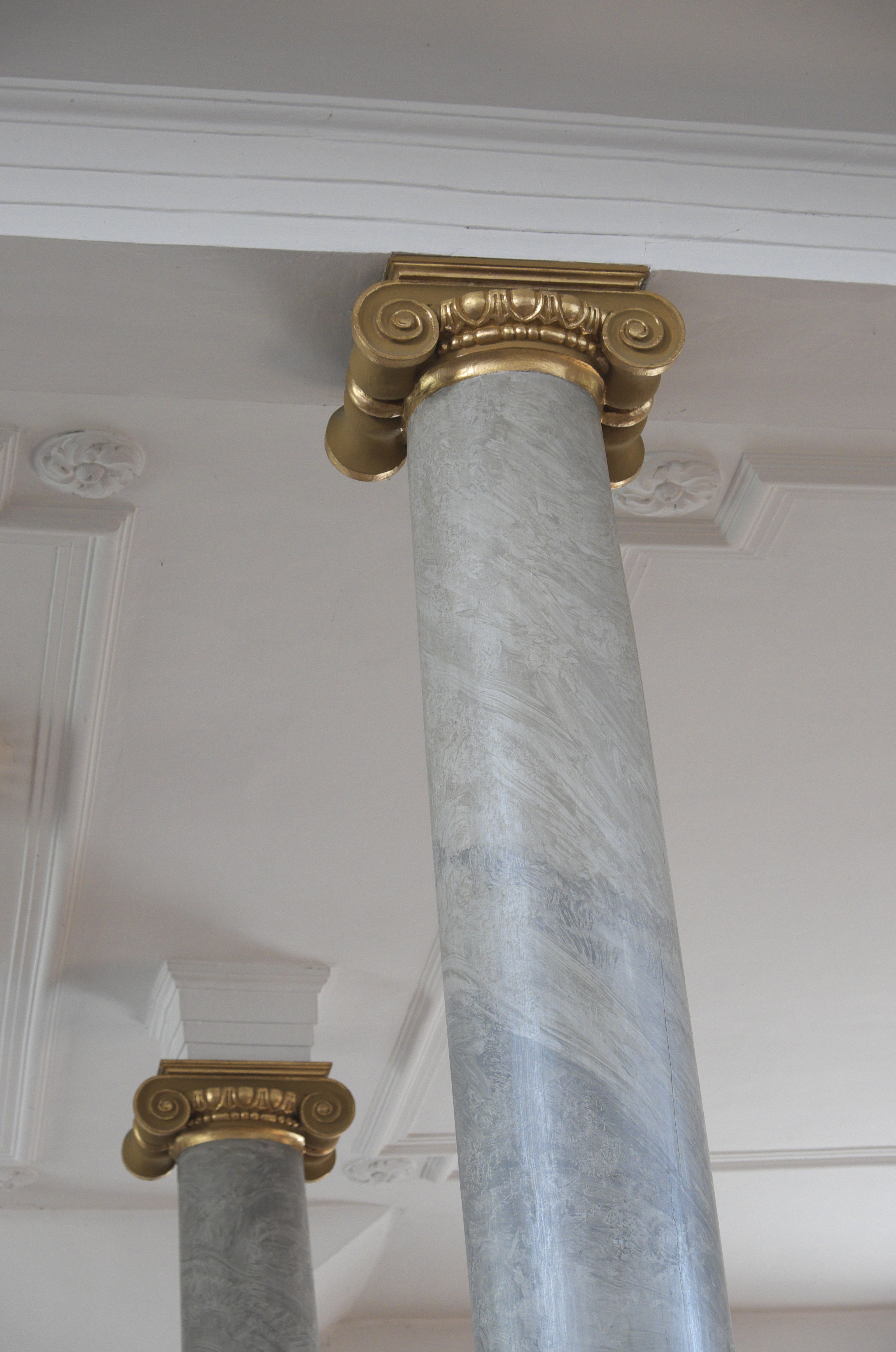 Katholische Pfarrkirche Mariä Heimsuchung in Lechbruck am See im Landkreis Ostallgäu (Bayern/Deutschland), Säulen unter der Empore